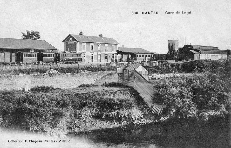 La gare de Legé à Nantes, origine de la ligne à voie métrique de Nantes à Legé.